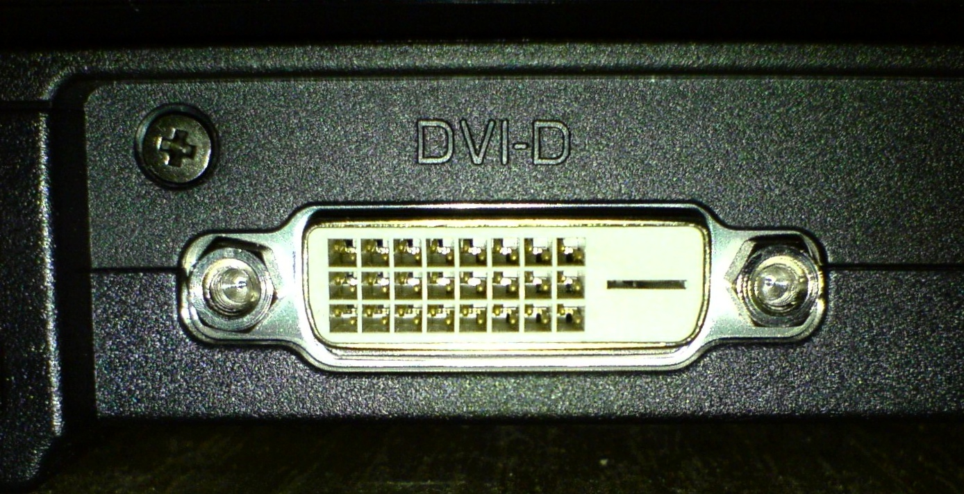 Samice DVI-D konektoru na zařízení.